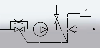 schemat obrazujący metodę regulacji sprężarki wyporowej za pomocą upustu i przepustnicy na wlocie powietrza